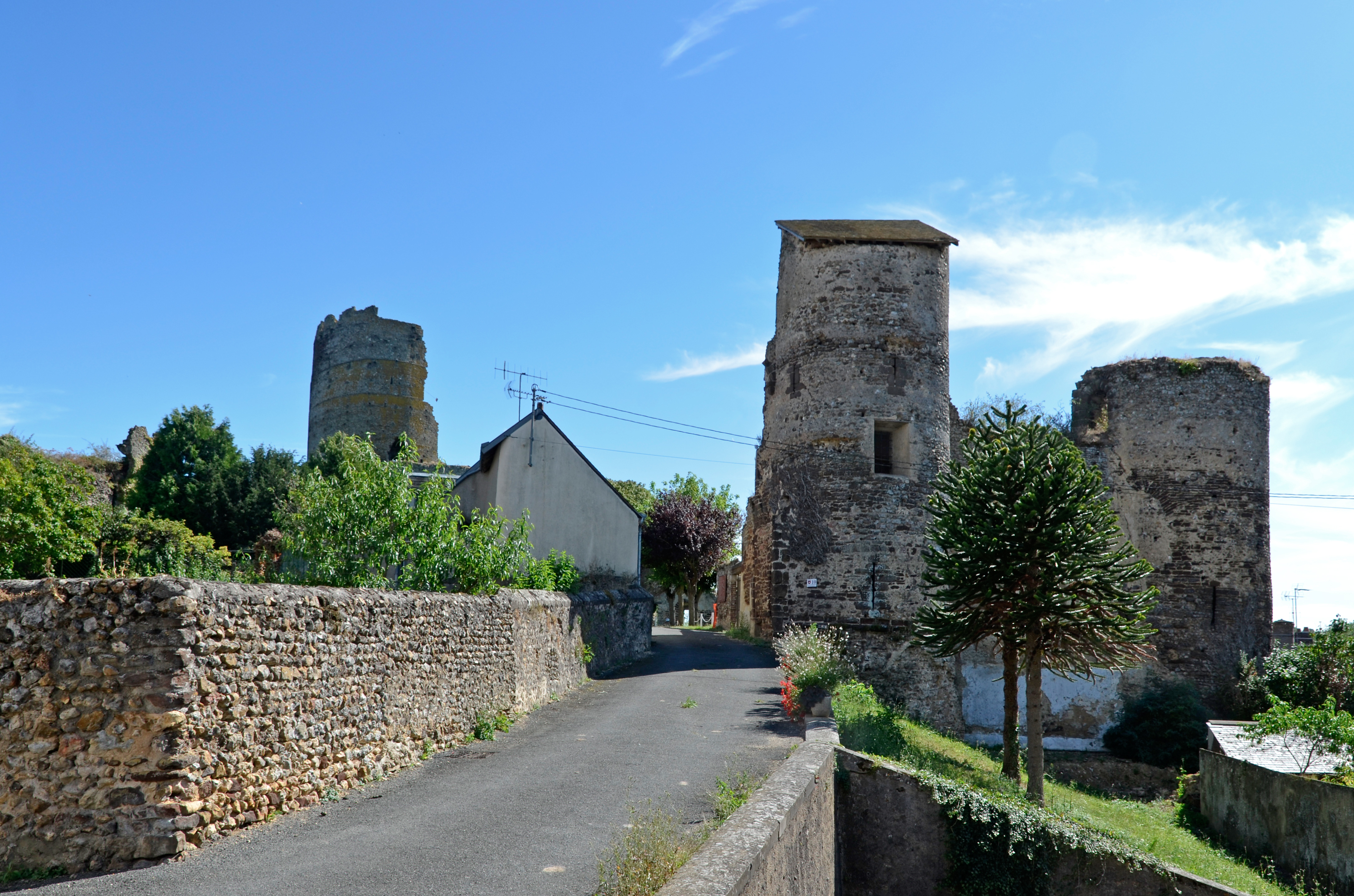 Château de Mondoubleau - Loir-et-Cher .